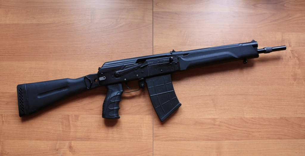 Гладкоствольное, самозарядное охотничье ружье.